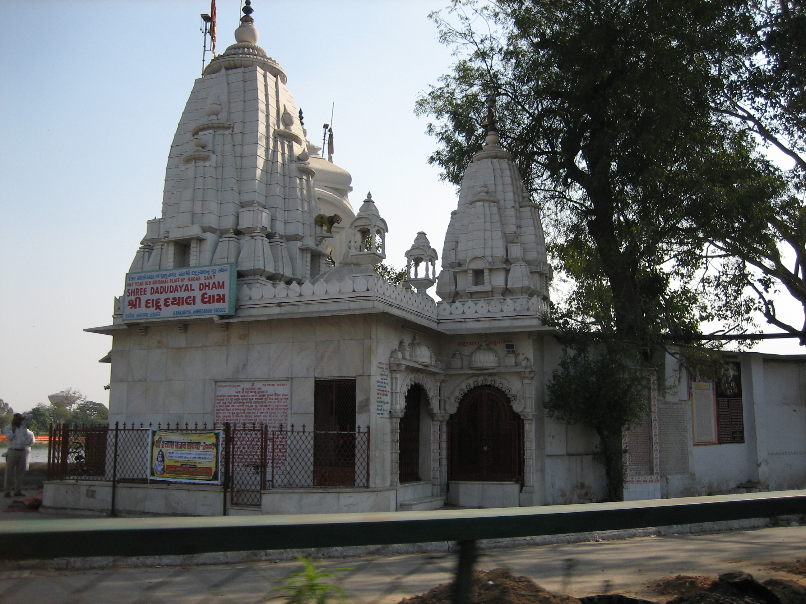 Ahmedabad 2007